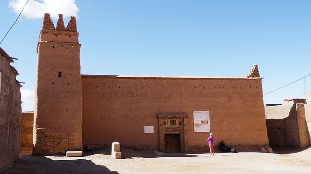 Speicherburg in Südmarokko